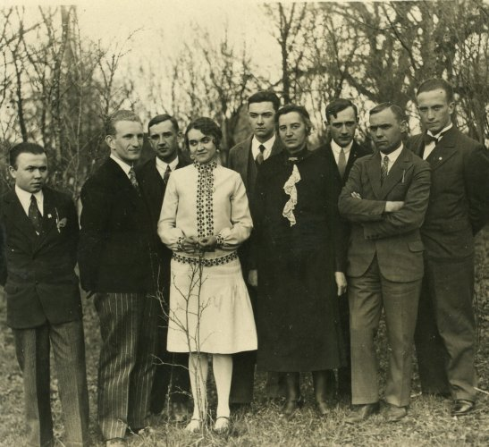 Зліва: невідомий пластун (на лацкані піджака пластова відзнака), Роман Шухевич, ?, Наталя Березинська, Юрко Березинський, ймовірно мама Наталі та Юрка Березинських Юзефа (з дому Глинянських), невідомі. В 1930 році Романа покликали на пост бойового референта Крайової екзекутиви ОУН, і він ціпком поринув в революційну діяльність. Одним з його найкращих бойовиків був Юрко Березинський, який в березні 1932 року виконав успішний атентат на комісара поліції Чеховського. Однак у листопаді 1932 року, при невдалій спробі «ексу» у Городку, поранений Юрко себе застрілить, щоб не потрапити живим у руки ворога.